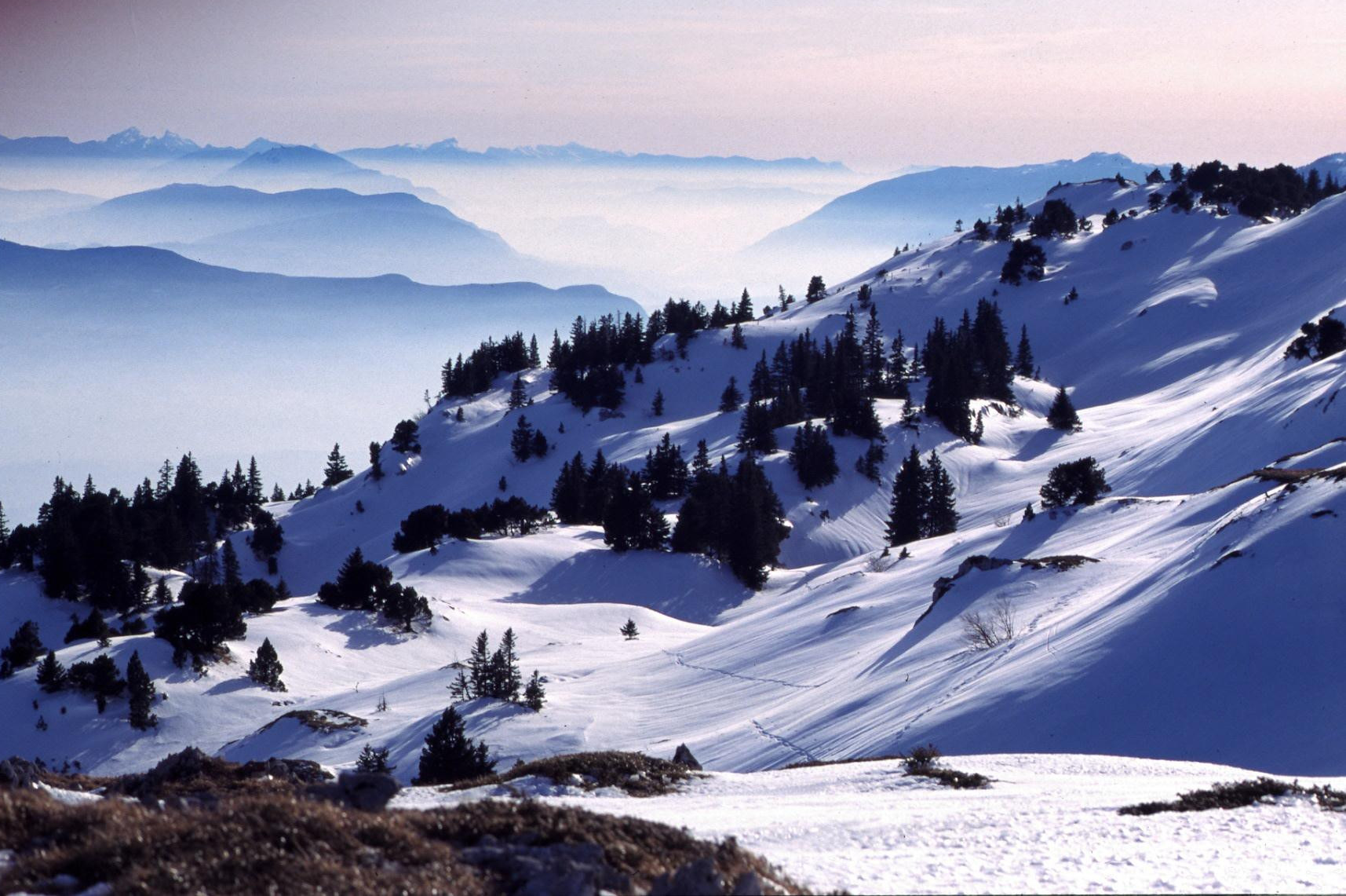 Sur les crêtes du Jura au mois de février aux environs du Crêt de la Neige. Diapositive scannée.